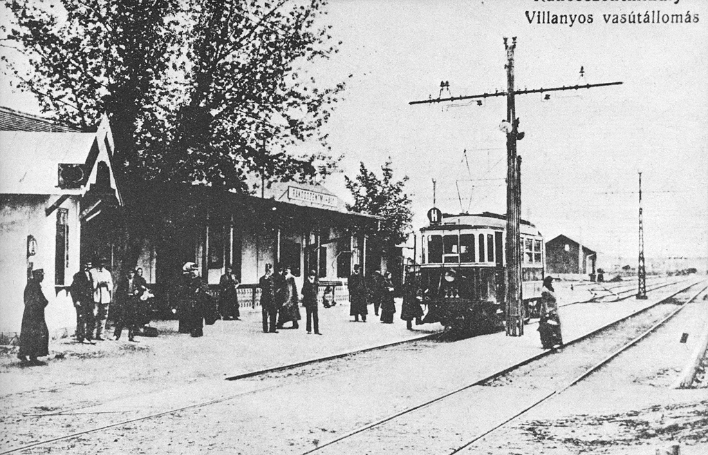 A H járat egyik kocsija Rákosszentmihály (1916 után Nagyicce, 1904 előtt József főherceg-telep) állomáson